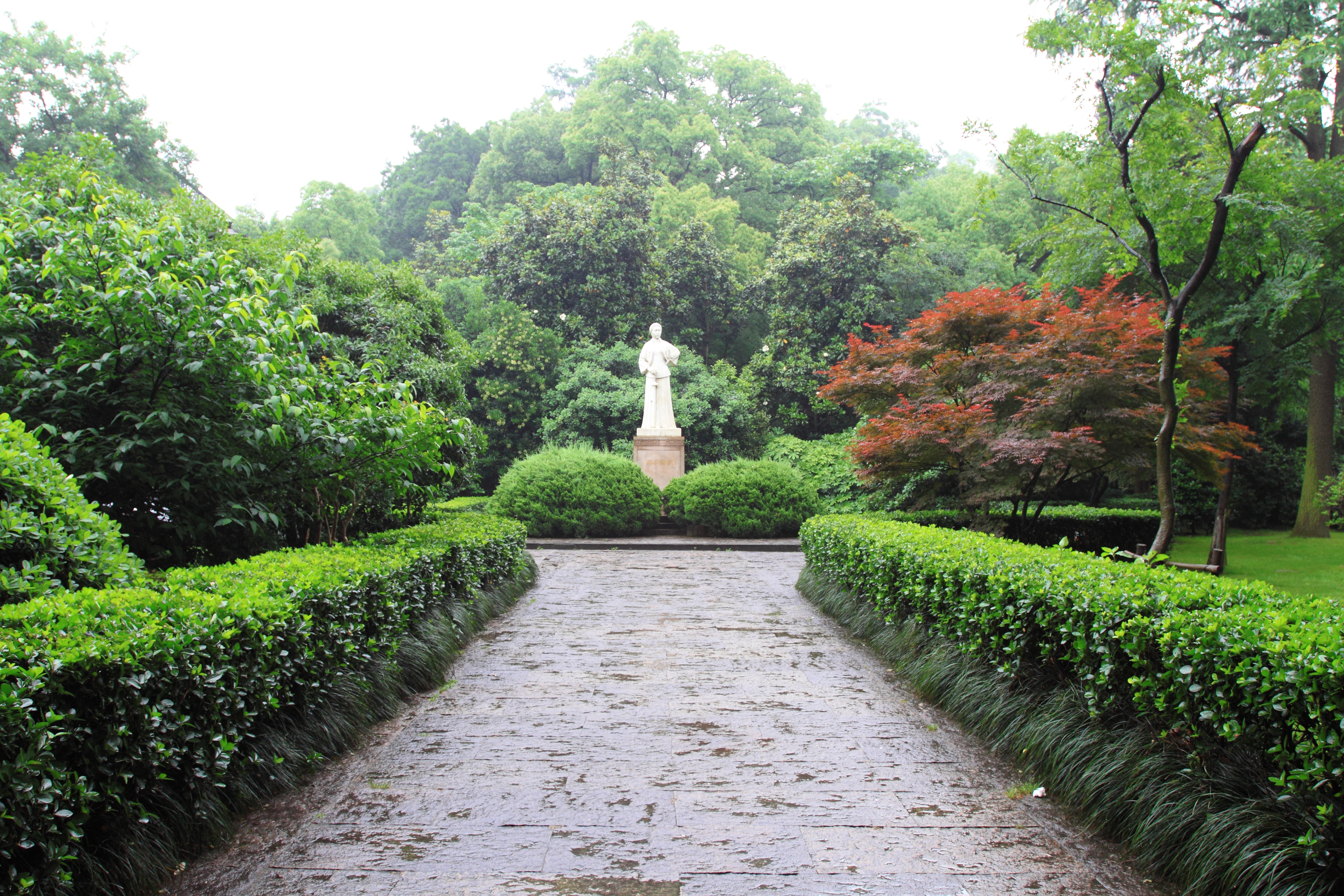 秋瑾墓，位于中国浙江省杭州市。